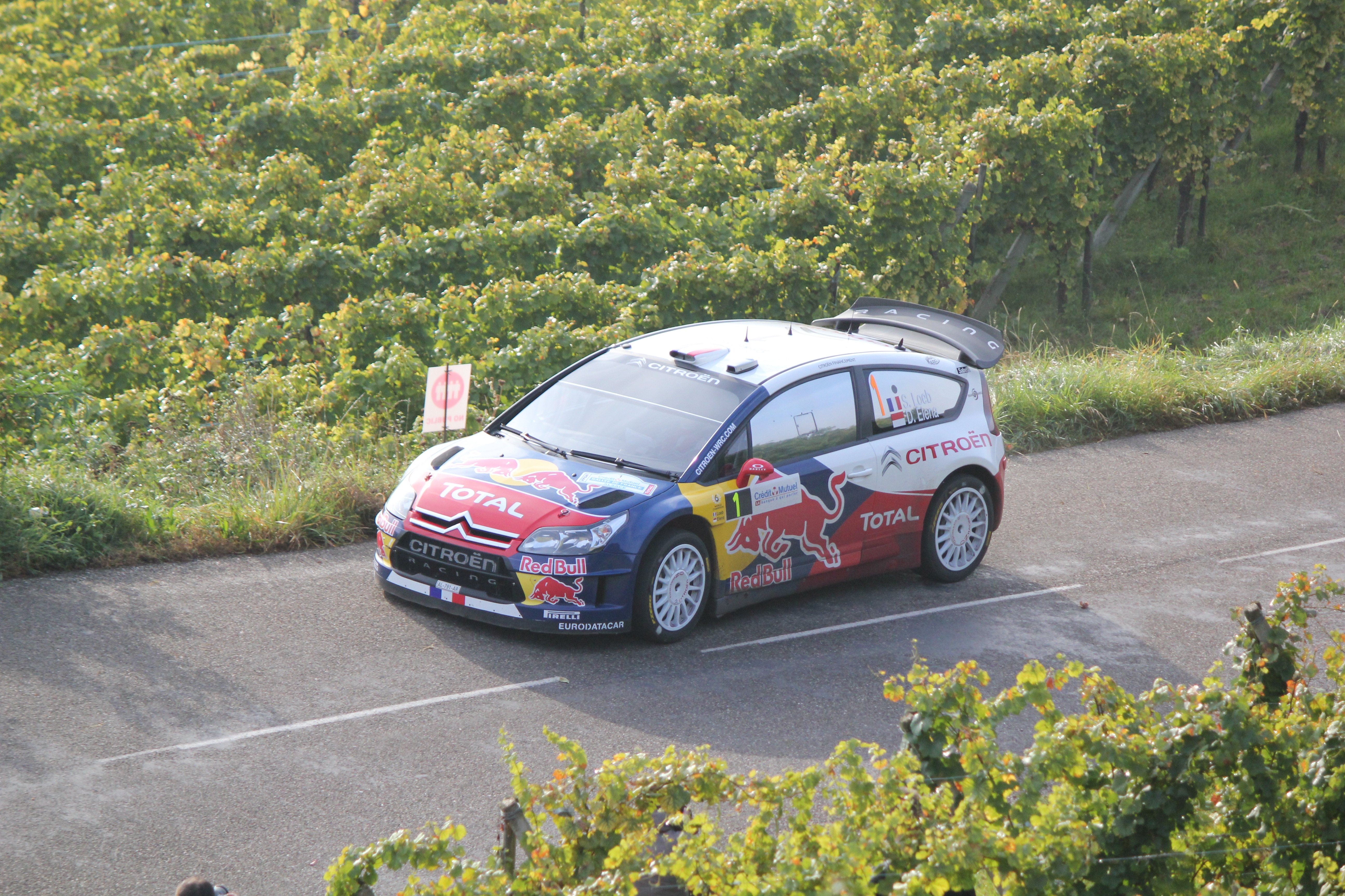 Sébastien Loeb & Daniel Elena, au premier jour du rallye de France Alsace lors des Championnat du monde des rallyes 2010.